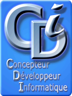 Logo du Titre Professionnel CDI - Concepteur Développeur Informatique